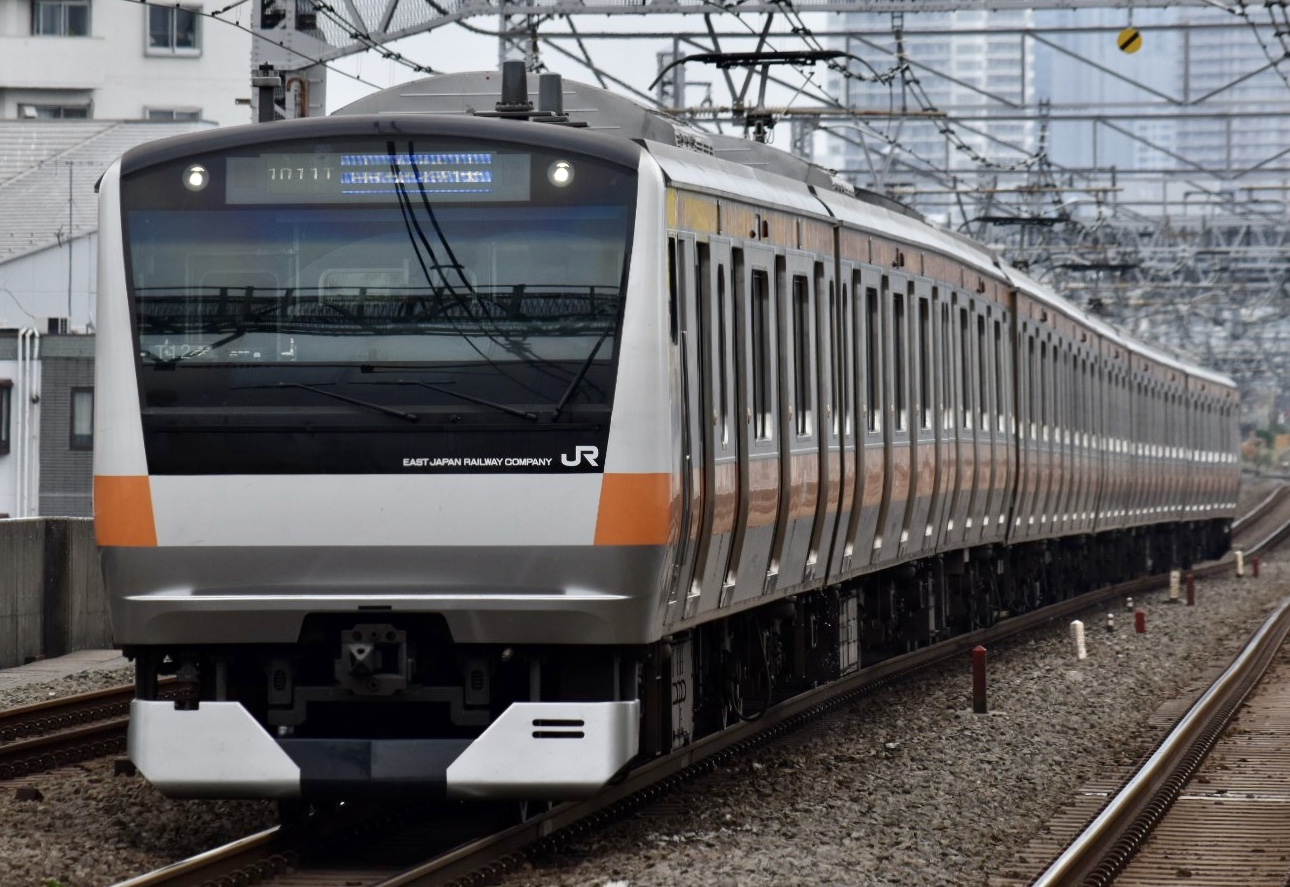 JR東日本E233系電車 中央特快高尾